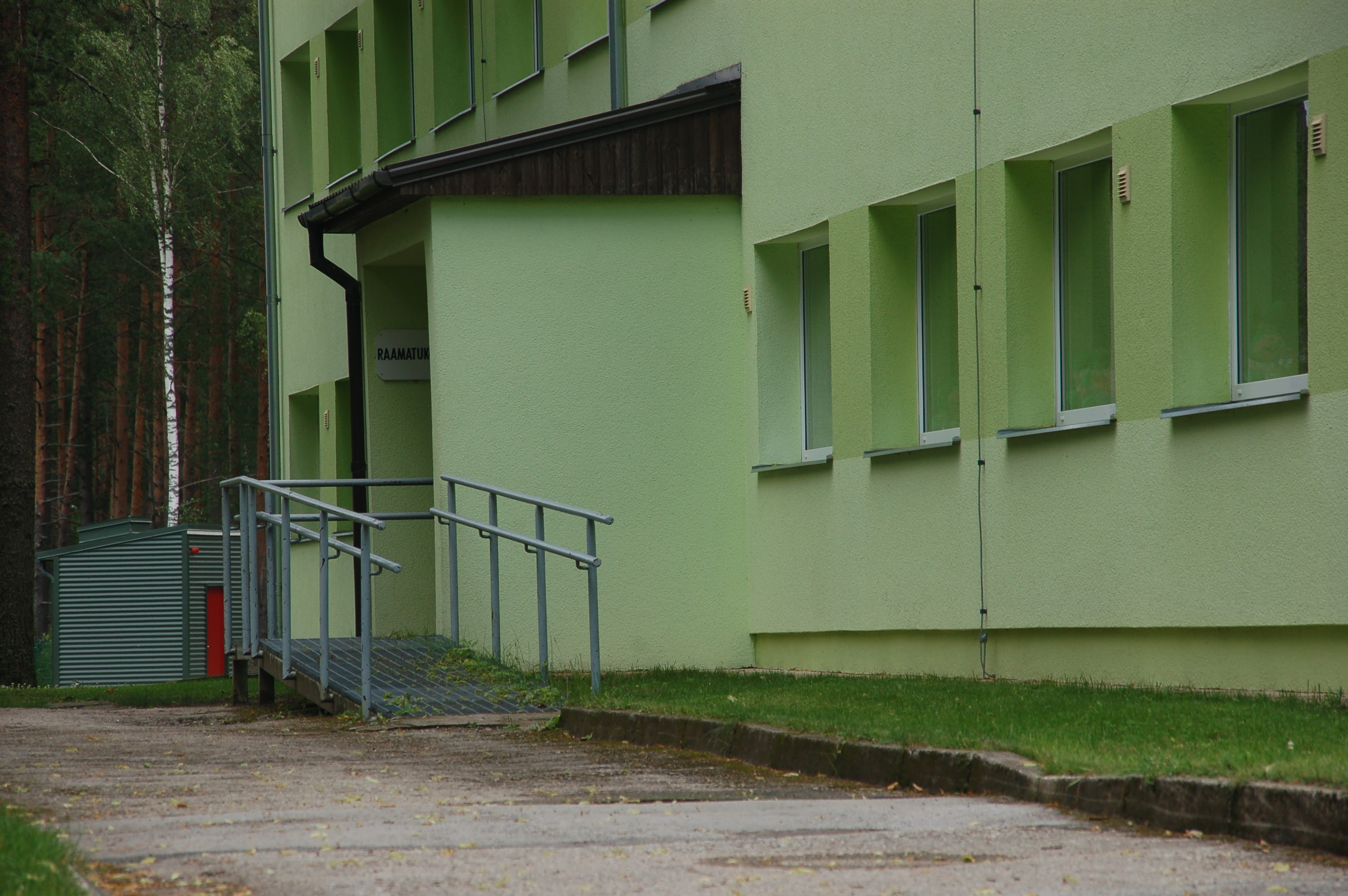 Kilingi Nõmme raamatukogu sissepääs 2016